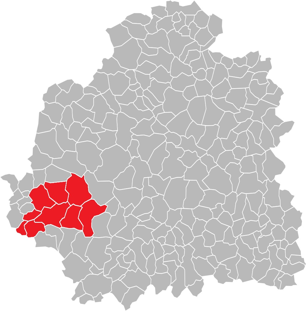 Carte des communes de l'Indre (36) : Le canton du Blanc, de 1790 à 2015.